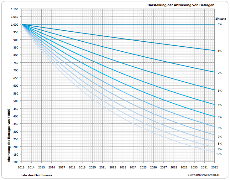 Abzinsungsfaktoren als Diagramm der jährlichen Abzinsung von Beträgen